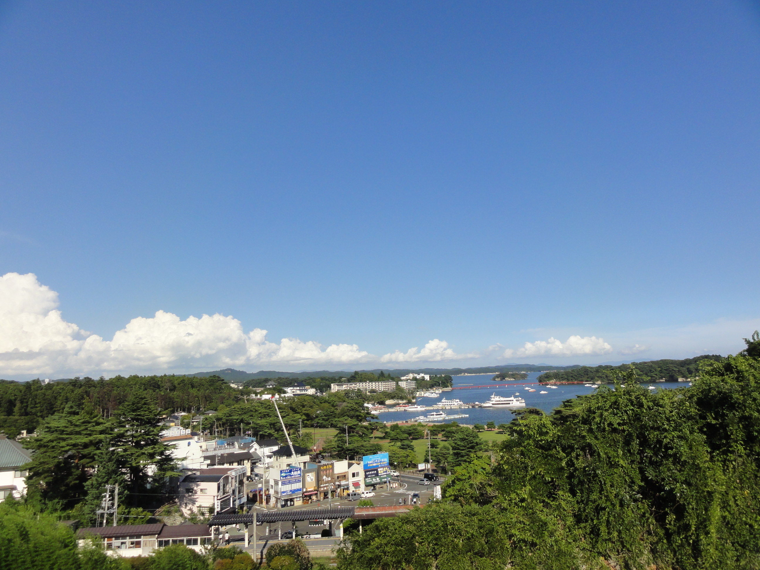 松島町の観光街